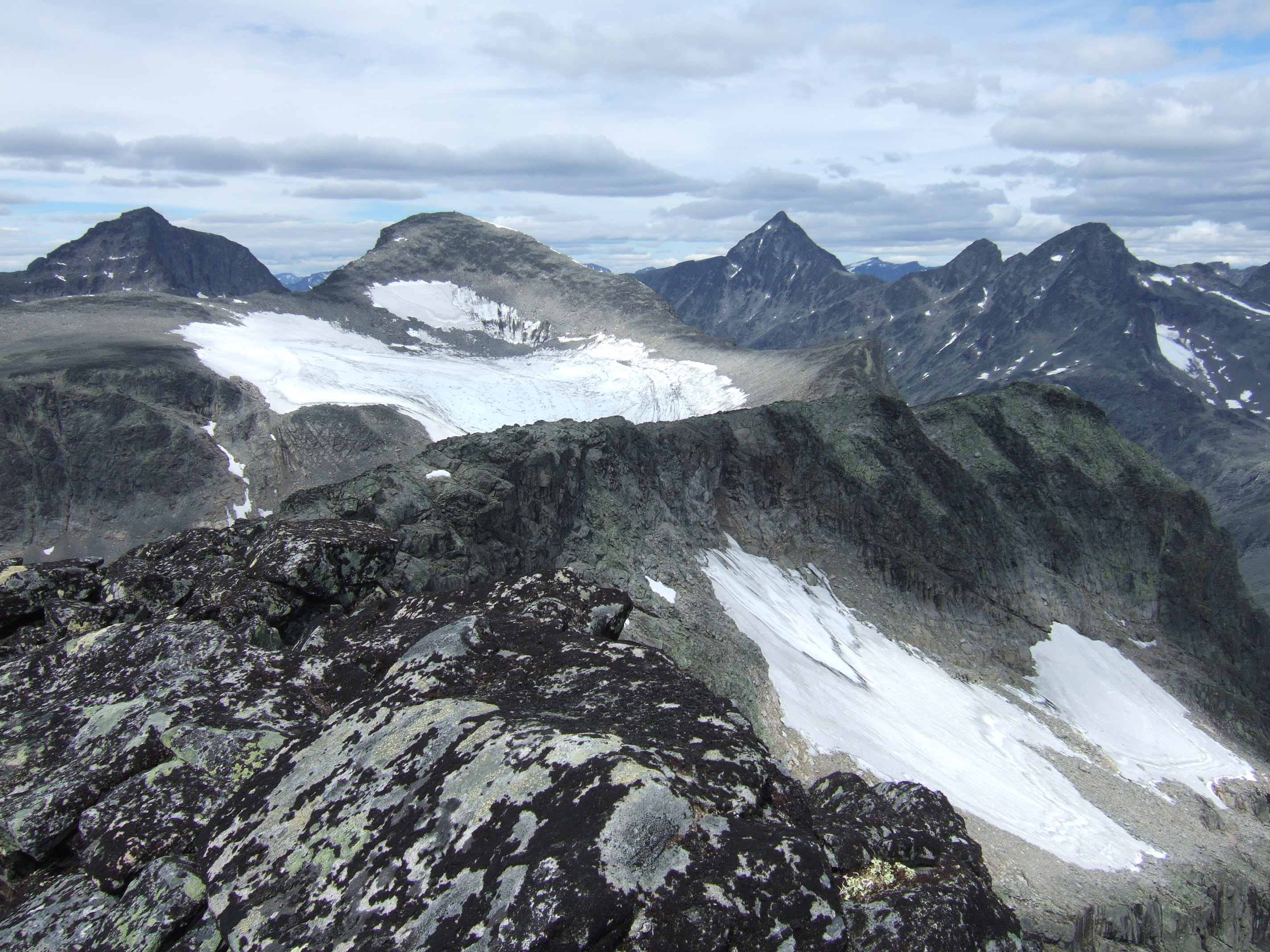 Mesmogtinden, Kvitskardtinden og Store Knutsholtinden sett fra et sted ved Vestre Torfinnstinden, Jonunheimen.